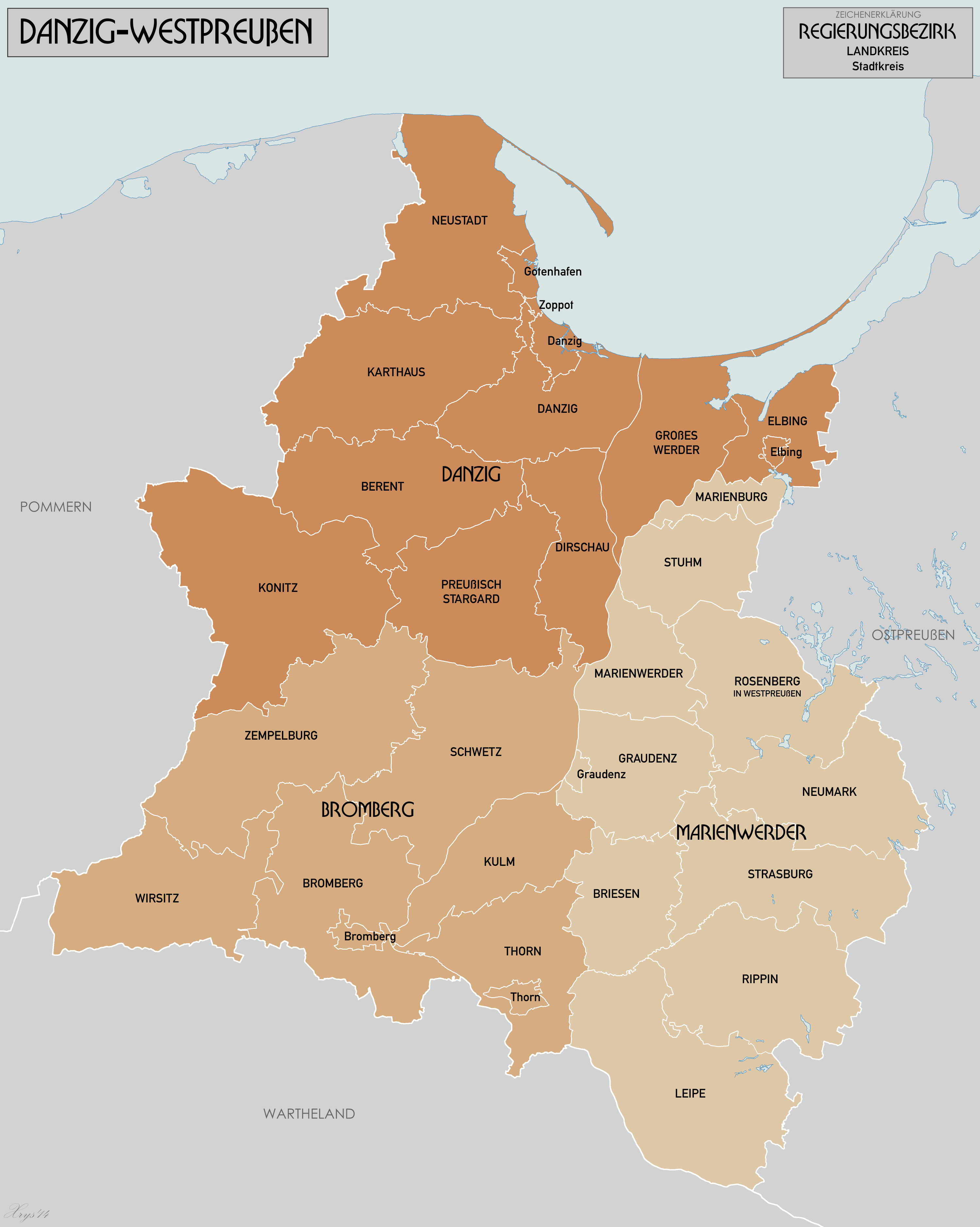 Verwaltungskarte der Reichsgau Danzig-West Prussia in 1944. Karte digitalisiert aus Karte des Deutschen Reiches 1:100k, Karte von Mitteleuropa 1:300k, Topographisches Karte 1:25k. Einiges Quellen aus WIG (